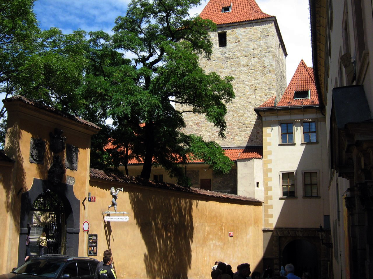 Pražský hrad, Jiřská, v pozadí Černá věž